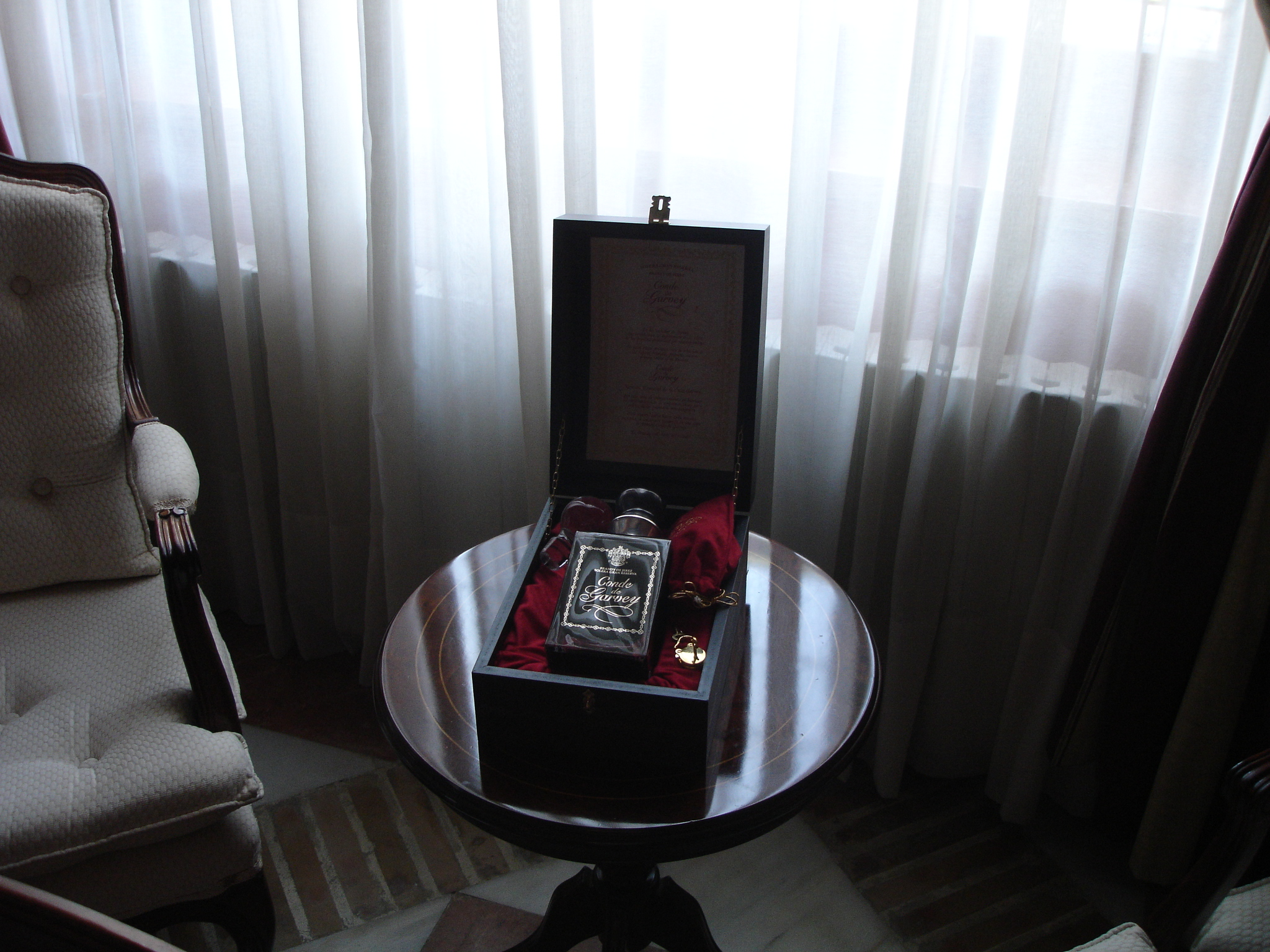 Brandy de Jerez Conde de Garvey at Bodegas Valdivia in Jerez, Andalusia (Spain)